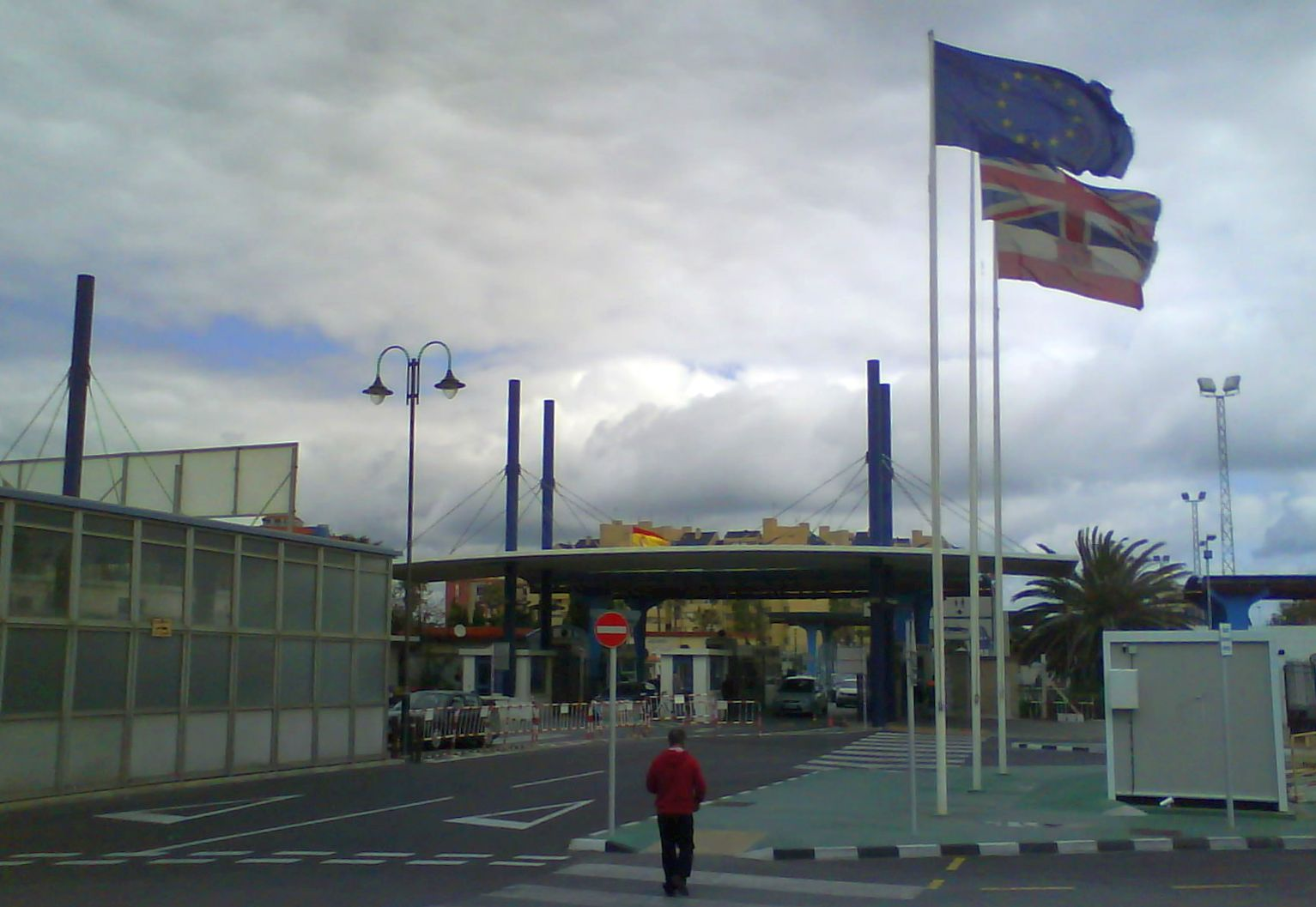 frontera Gibraltar (Reino Unido) con Cadiz (ESPAÑA)